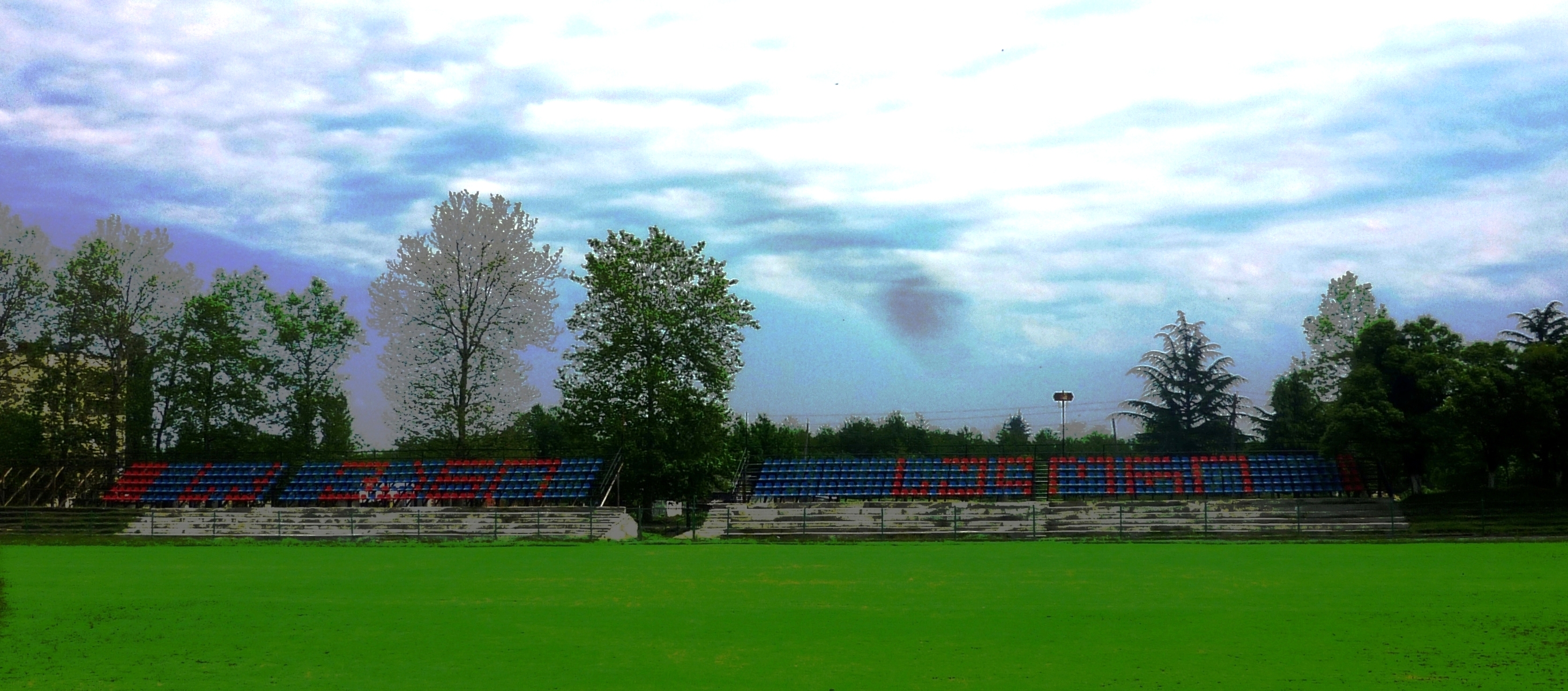 ნიკოლეიშვილის სტადიონის აღმოსავლეთ ტრიბუნა